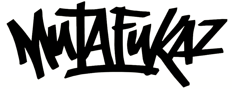 Logotype de la série de bande dessinée Mutafukaz et du film Mutafukaz.